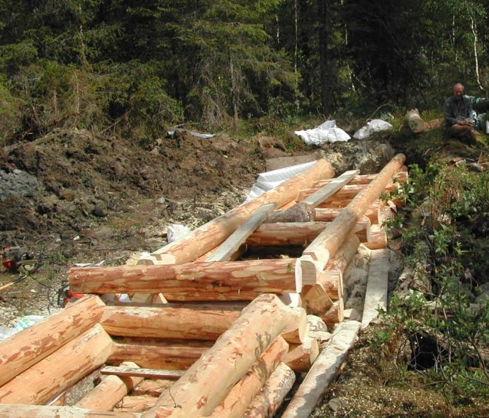 Lafting av kistedam i Vefsn.